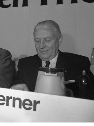 8.11.1983 CDU-Fachkongress über Europäische Sicherheit mit Bundeskanzler Kohl im Konrad-Adenauer-Haus.